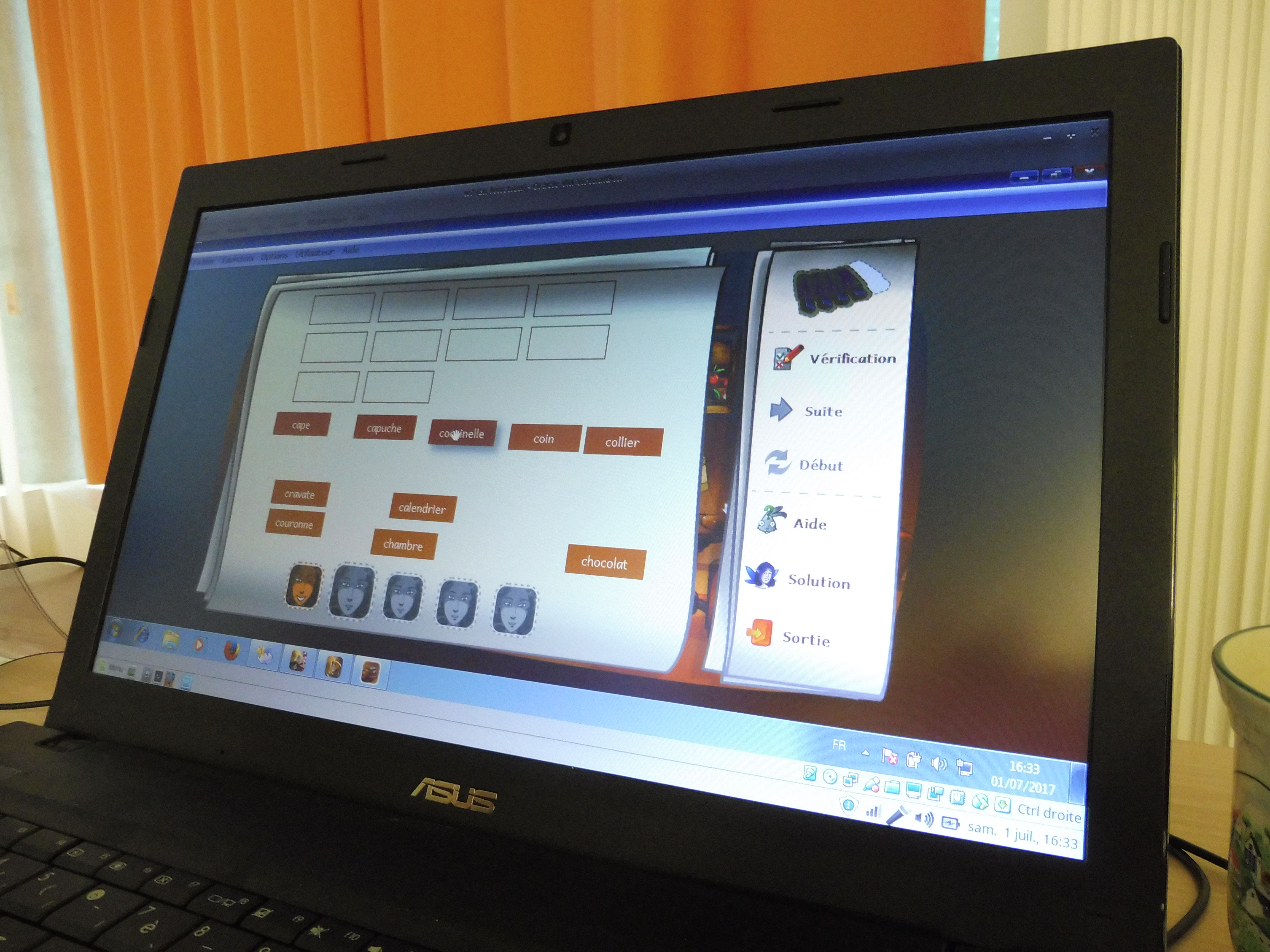 La suite logicielle AbulÉdu à Podensac-33 le samedi 1er juillet 2017 ː recherche de l'ordre alphabétique avec ALLER.